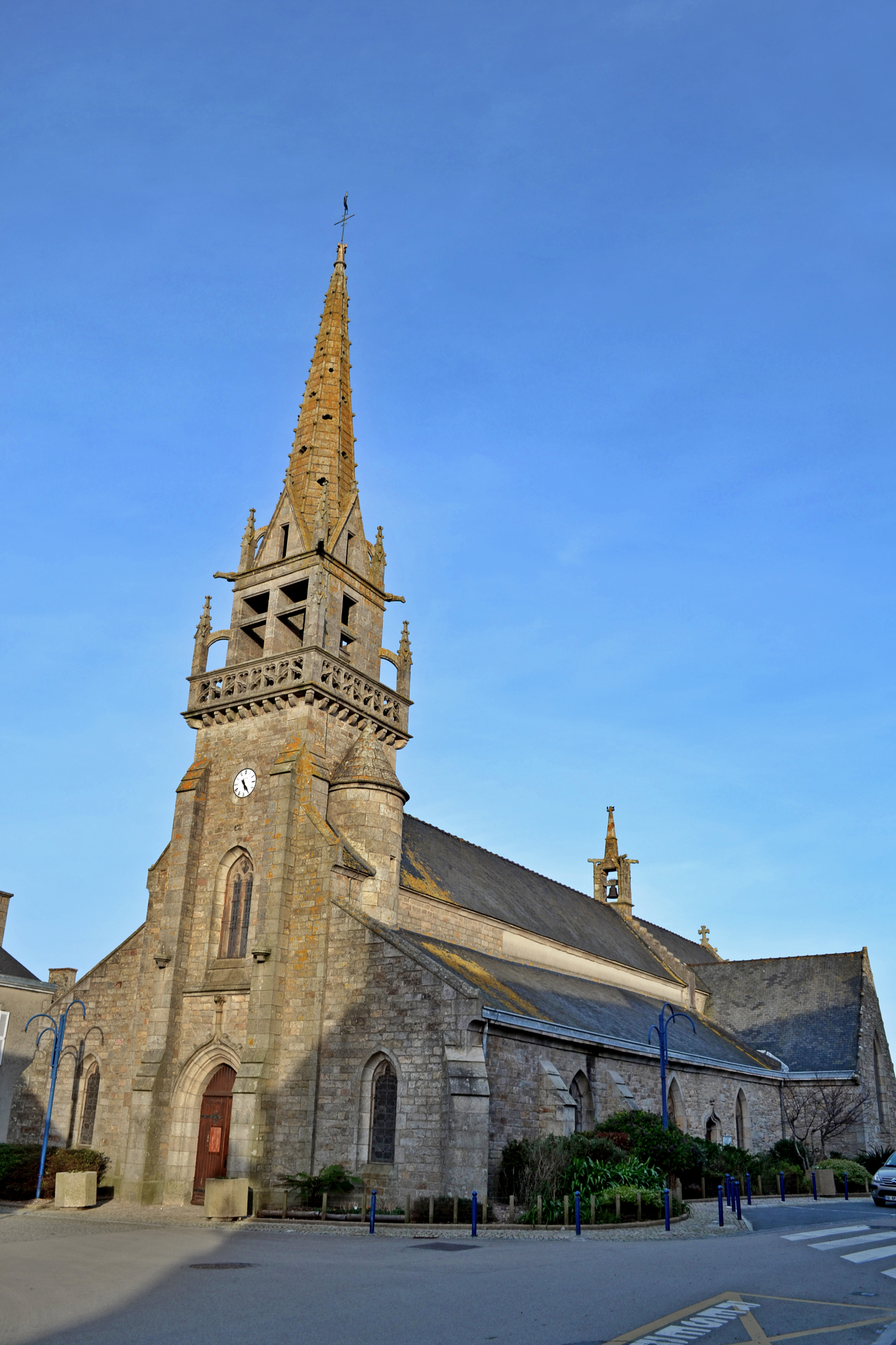 Eglise Saint-Adrien à Santec (Finistère, Bretagne).